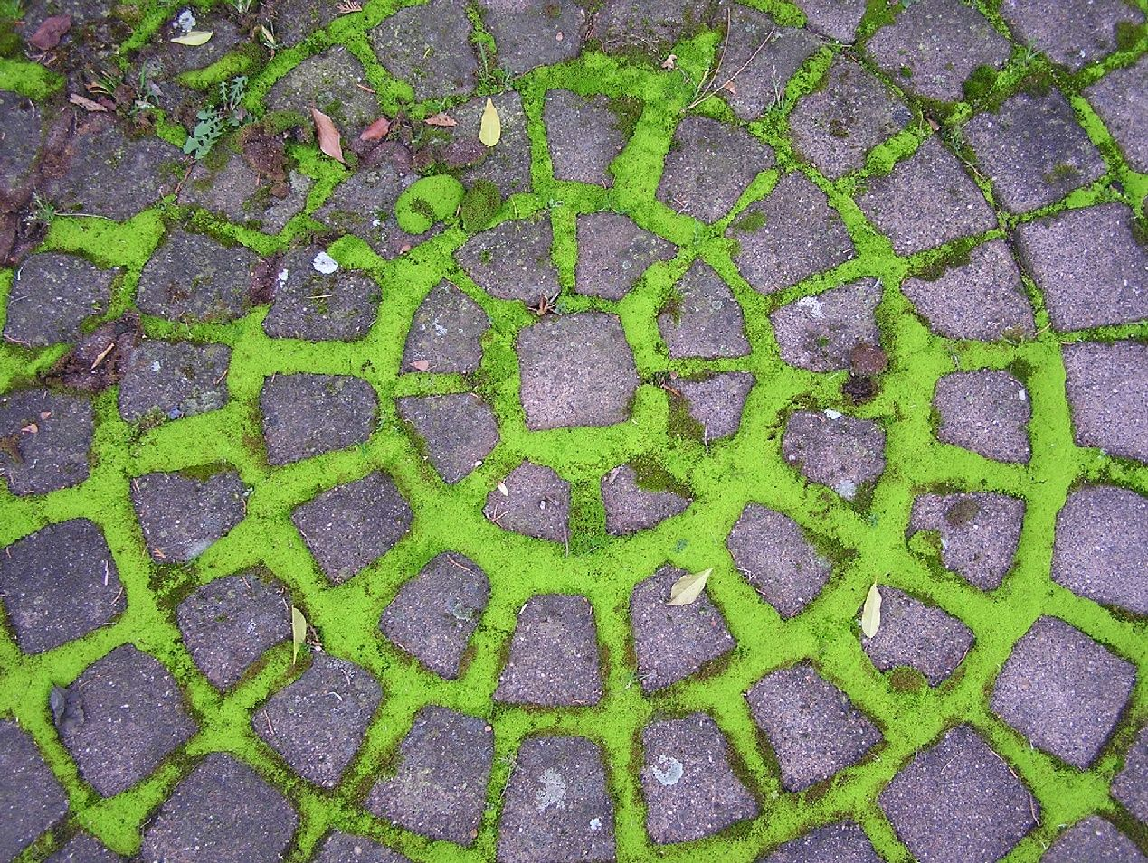 Barbula convoluta in Pflasterritzen in der Nähe von Neuss (Deutschland).